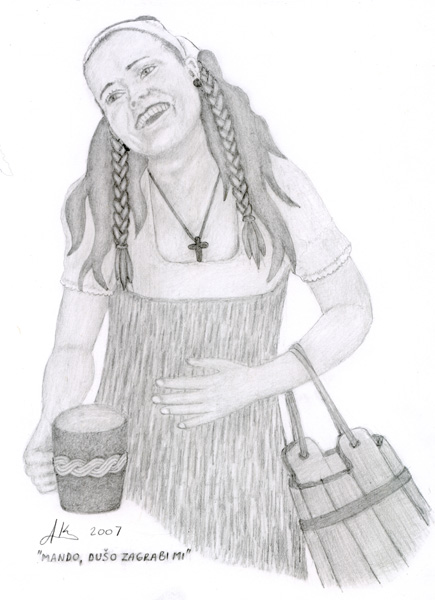 Zagrebačka Manda, crtež u olovci